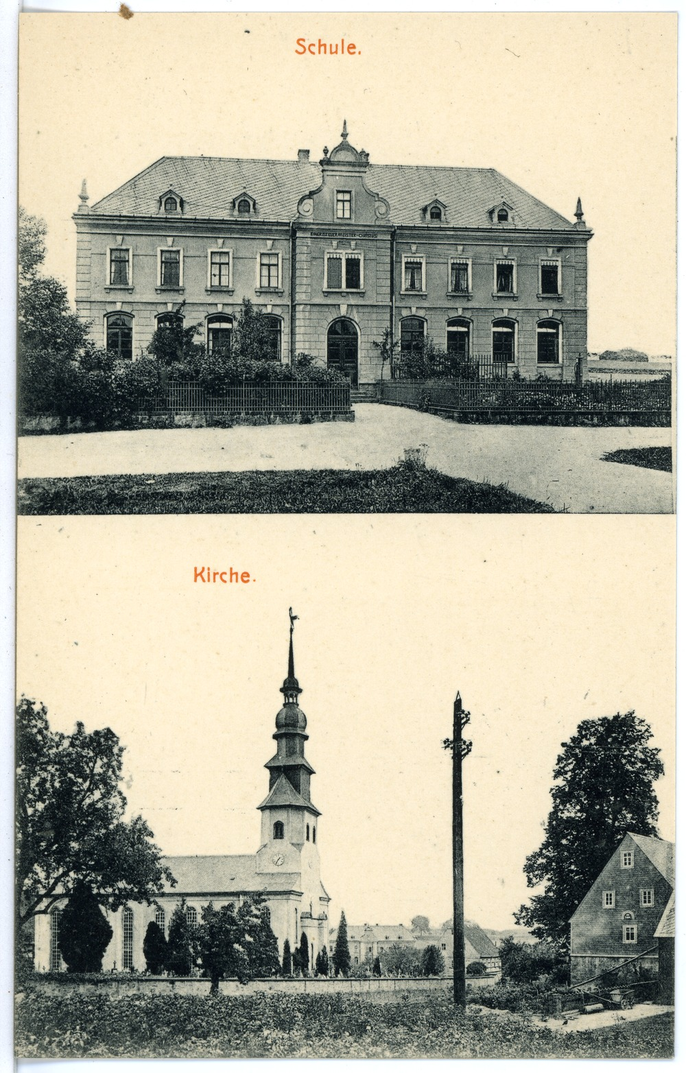 Grünlichtenberg; Kirche und Schule This postcard is from publisher Brück & Sohn in Meißen ( This postcard has a unique number 16682 and is available in a higher resolution at the publisher. This images was uploaded in a cooperation project between Wikipedians and the publisher.